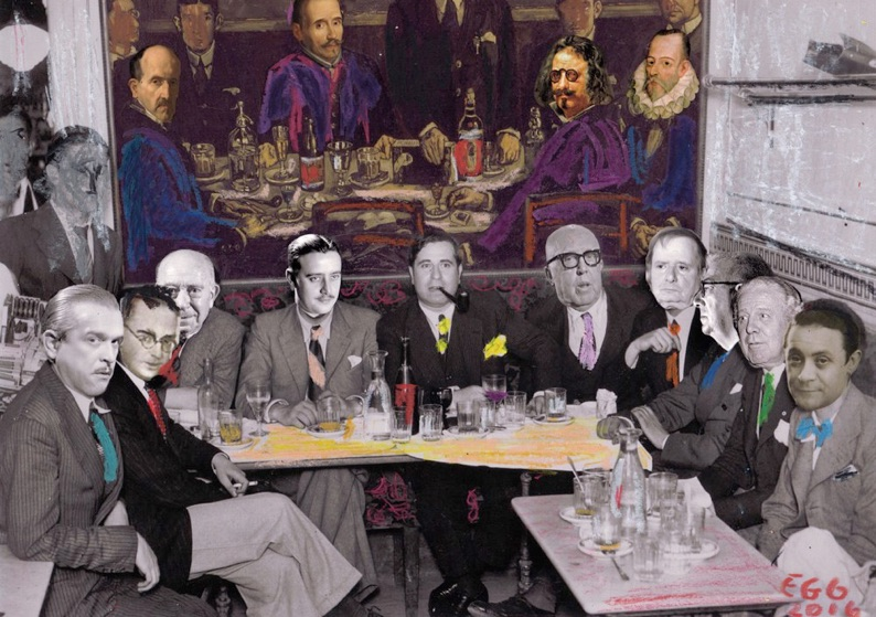 "Tertulia nanaísta de pombo" Artista Elena Guerrero Técnica mixta sobre papel" 21x29cm